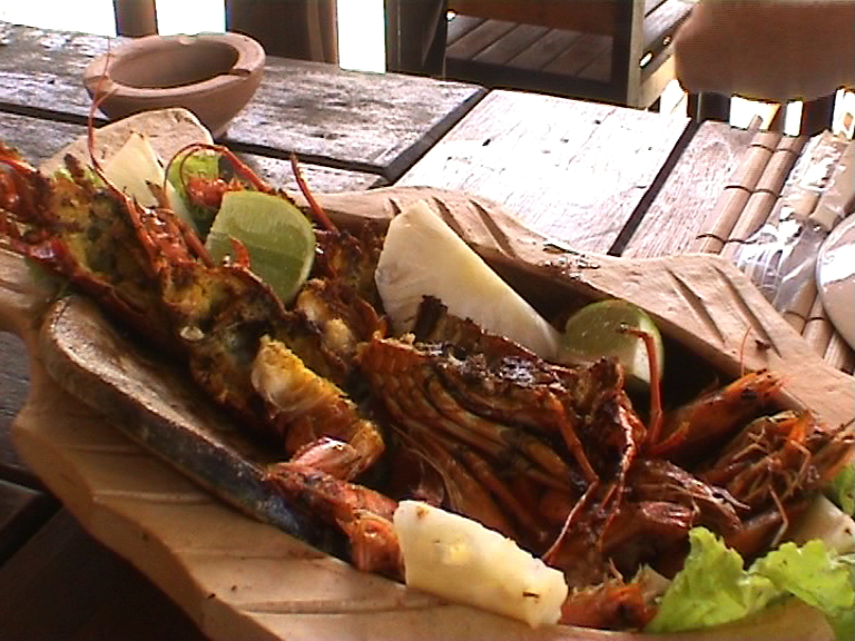 Marísc de l'illa.